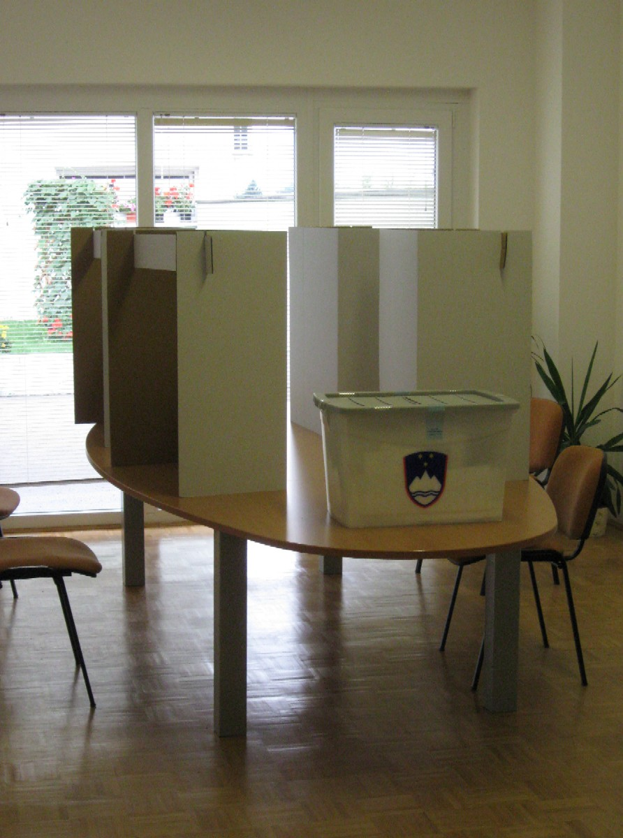 volisce_Slovenia_2008